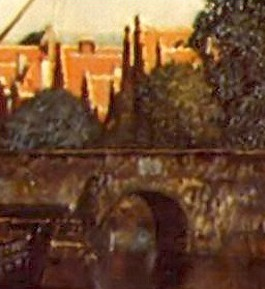 Vermeer: Ansicht von Delft, Ausschnitt